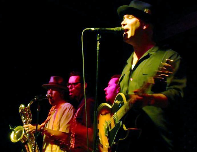 Big Bad Voodoo Daddyvoodoo_daddy